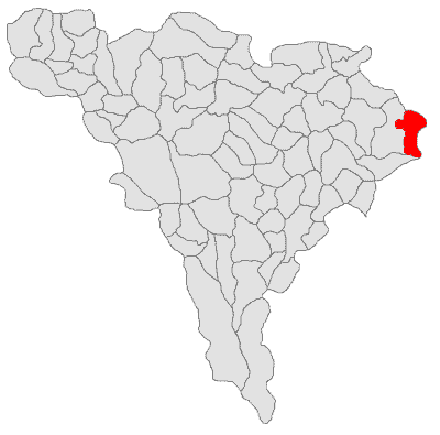 Categorie:Hărţi ale judeţului Alba